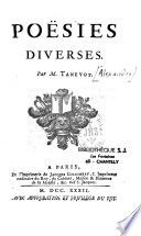 Page de couverture de Poésies de Tavenot